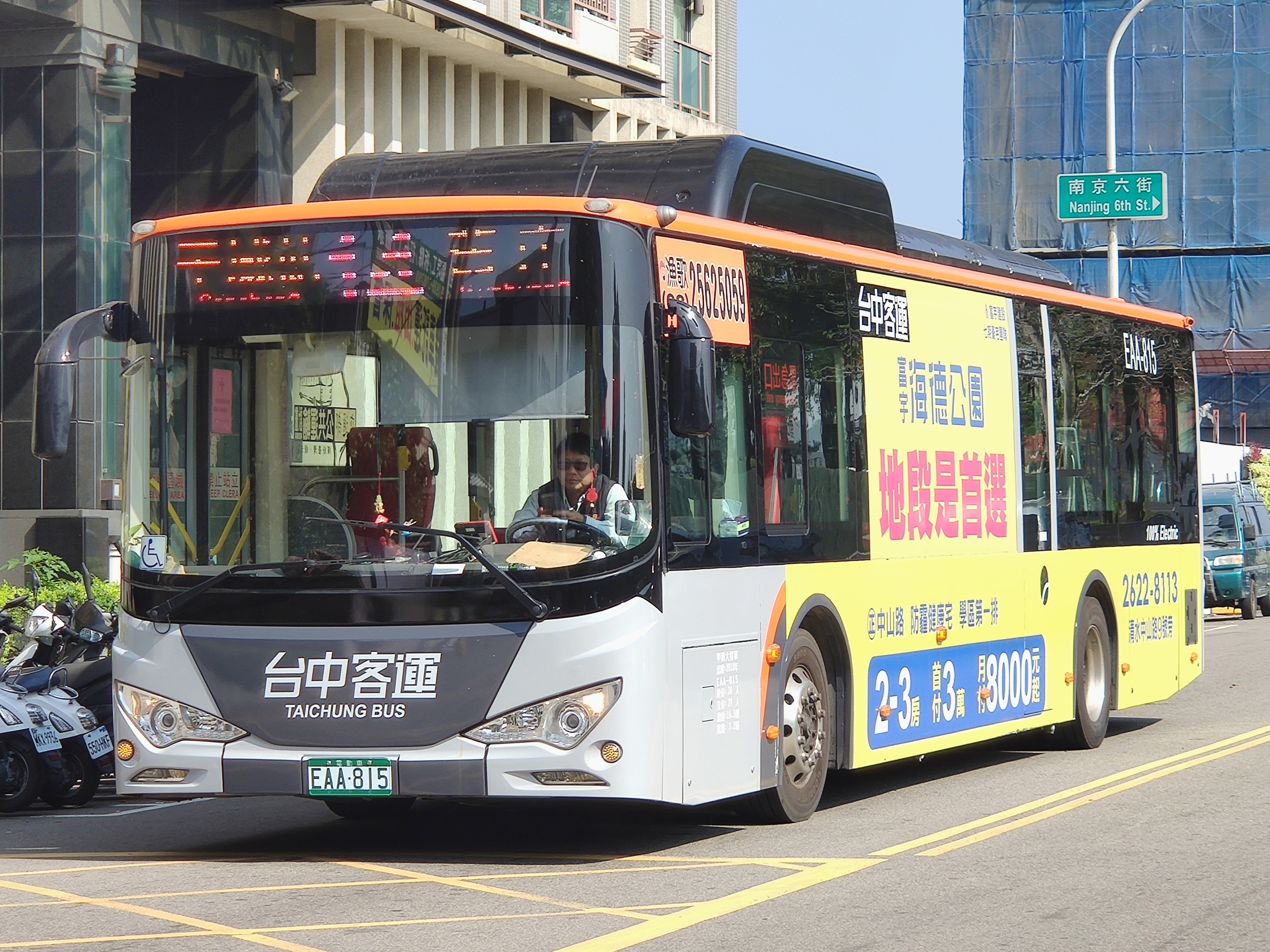 台中客運 比亞迪K9大客車 EAA-815